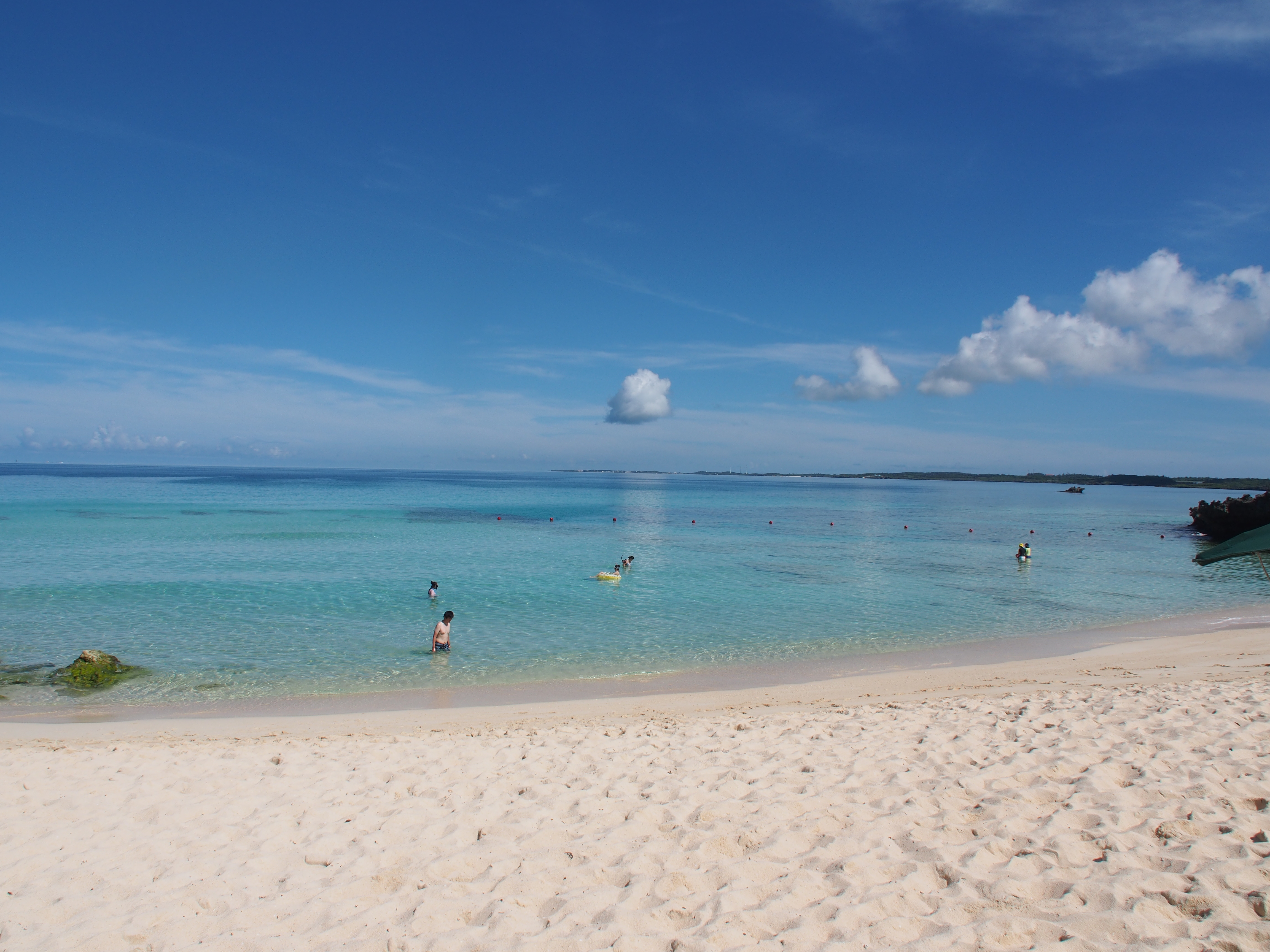 砂山ビーチ（沖縄県宮古島市宮古島）